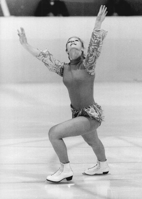 Marion Weber ADN-ZB Mittelstädt 5.11.74 London: Marion Weber gewann Richmond-Trophy. Die 15jährige Karl-Marx-Städterin Marion Weber (Foto von den Europameisterschaften 1974 in Zagreb) gewann am 4.11.74 bei internationalen Eiskunstlaufwettbewerben in London die Richmond-Trophy. Am Start waren 26 Aktive aus 17 Ländern. Abgebildete Personen: Weber, Marion: Eiskunstläuferin, SC Karl-Marx-Stadt, DDR